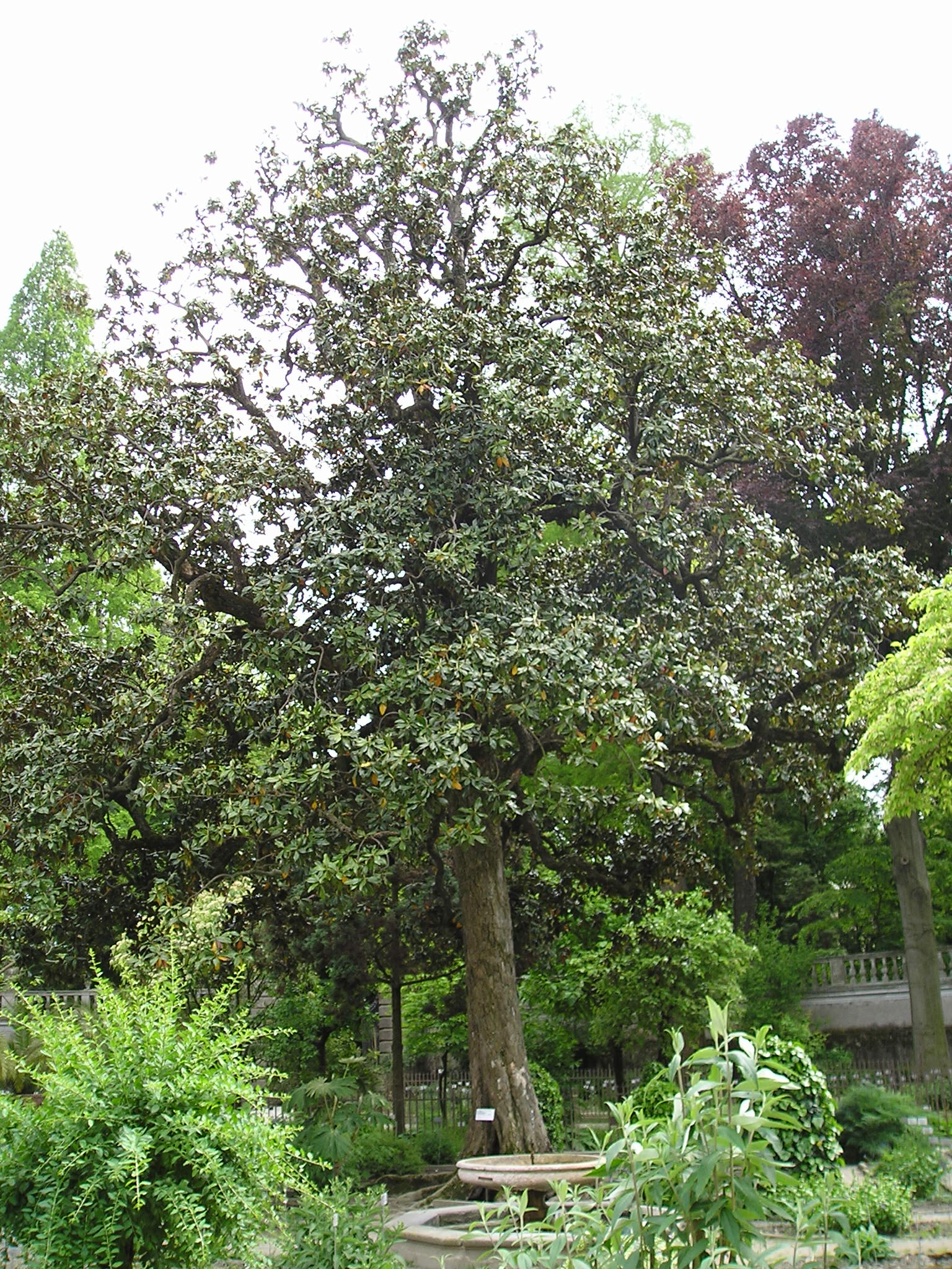 עץ מגנוליה.